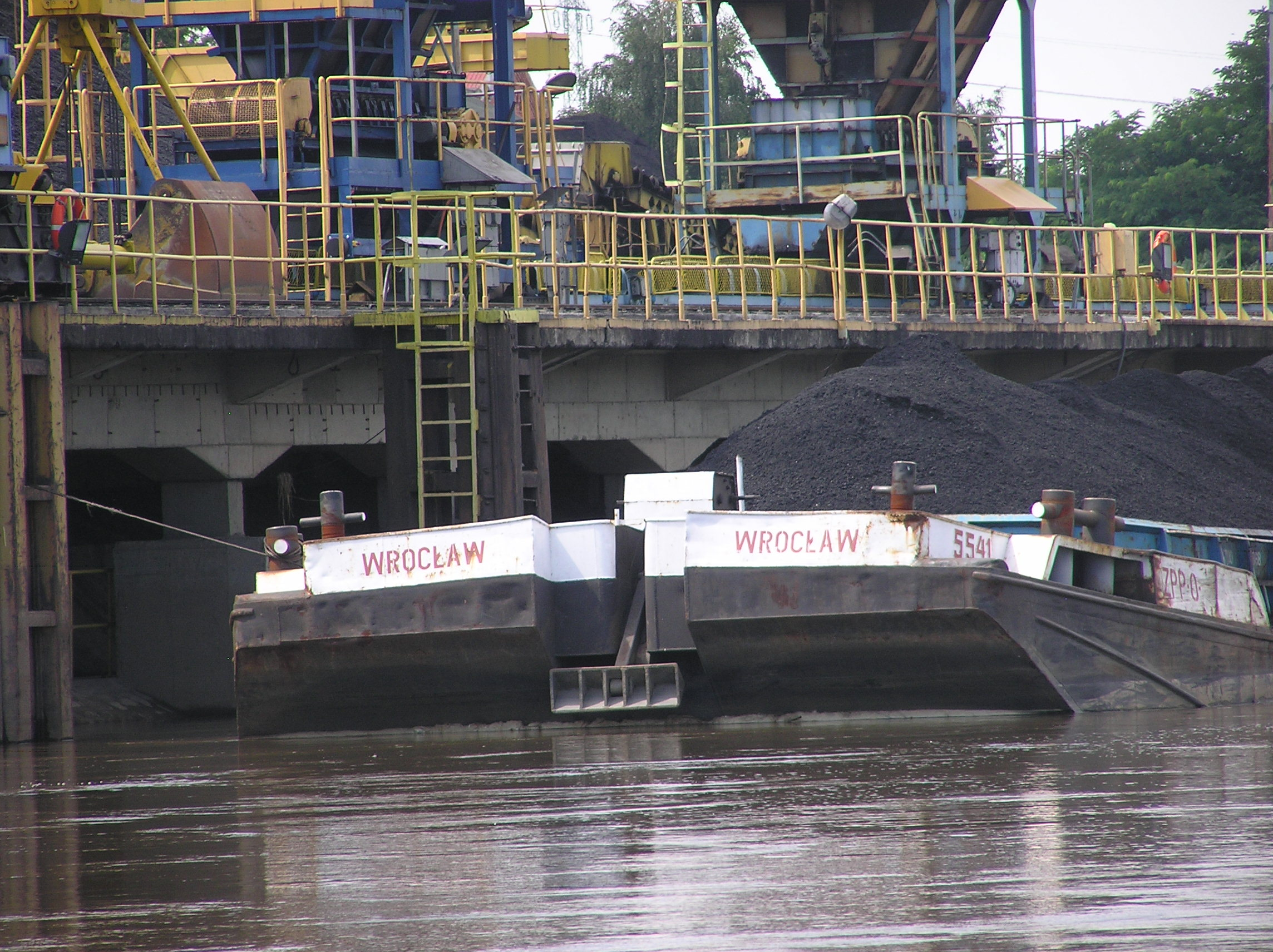 Wrocław, Kleczków, Odra - Kanał Miejski/Stara Odra, Przeładownia Elektrociepłowni Wrocław